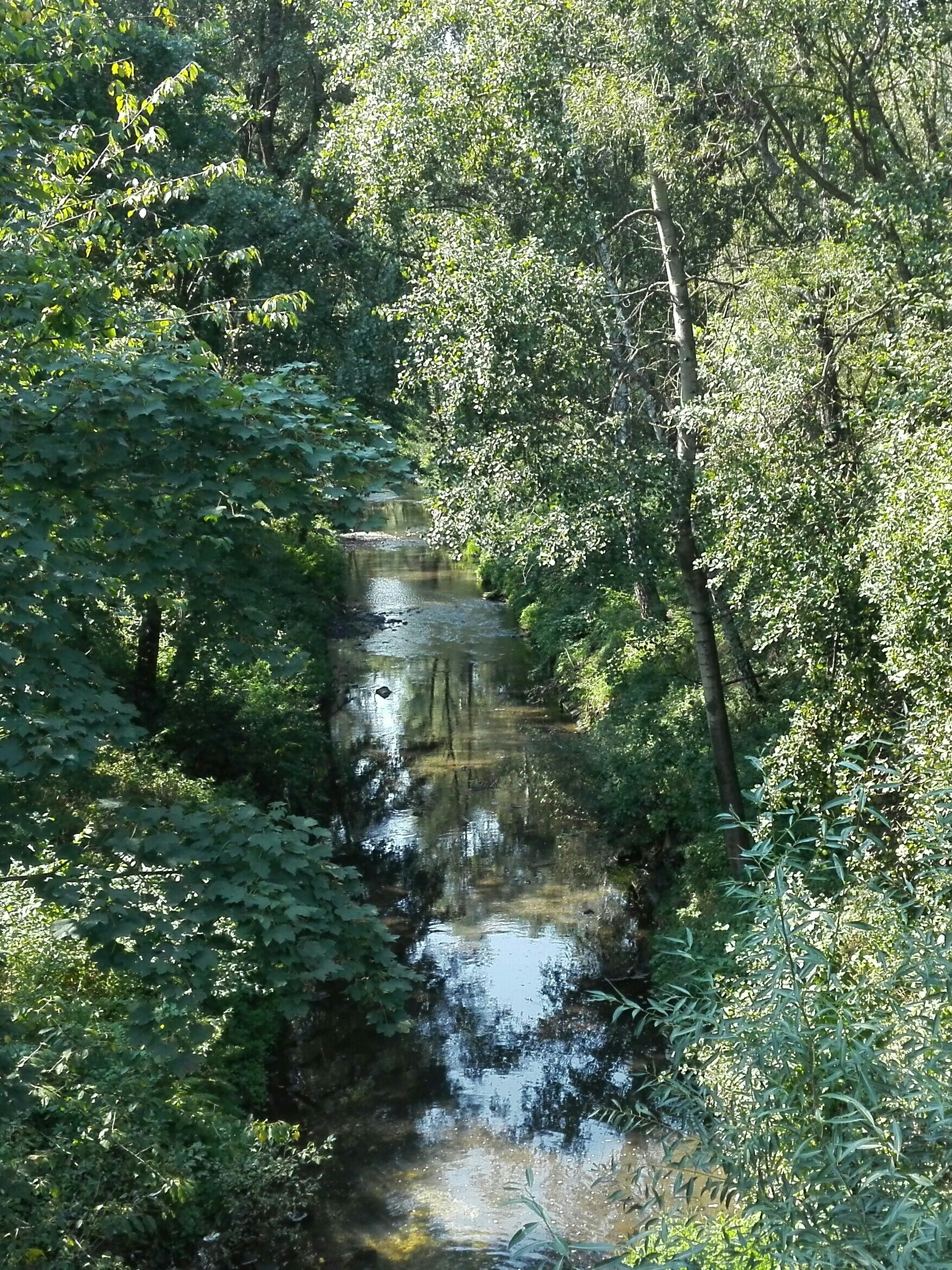 Říčka Sušanka ve svém dolním toku v Havířově-městě.